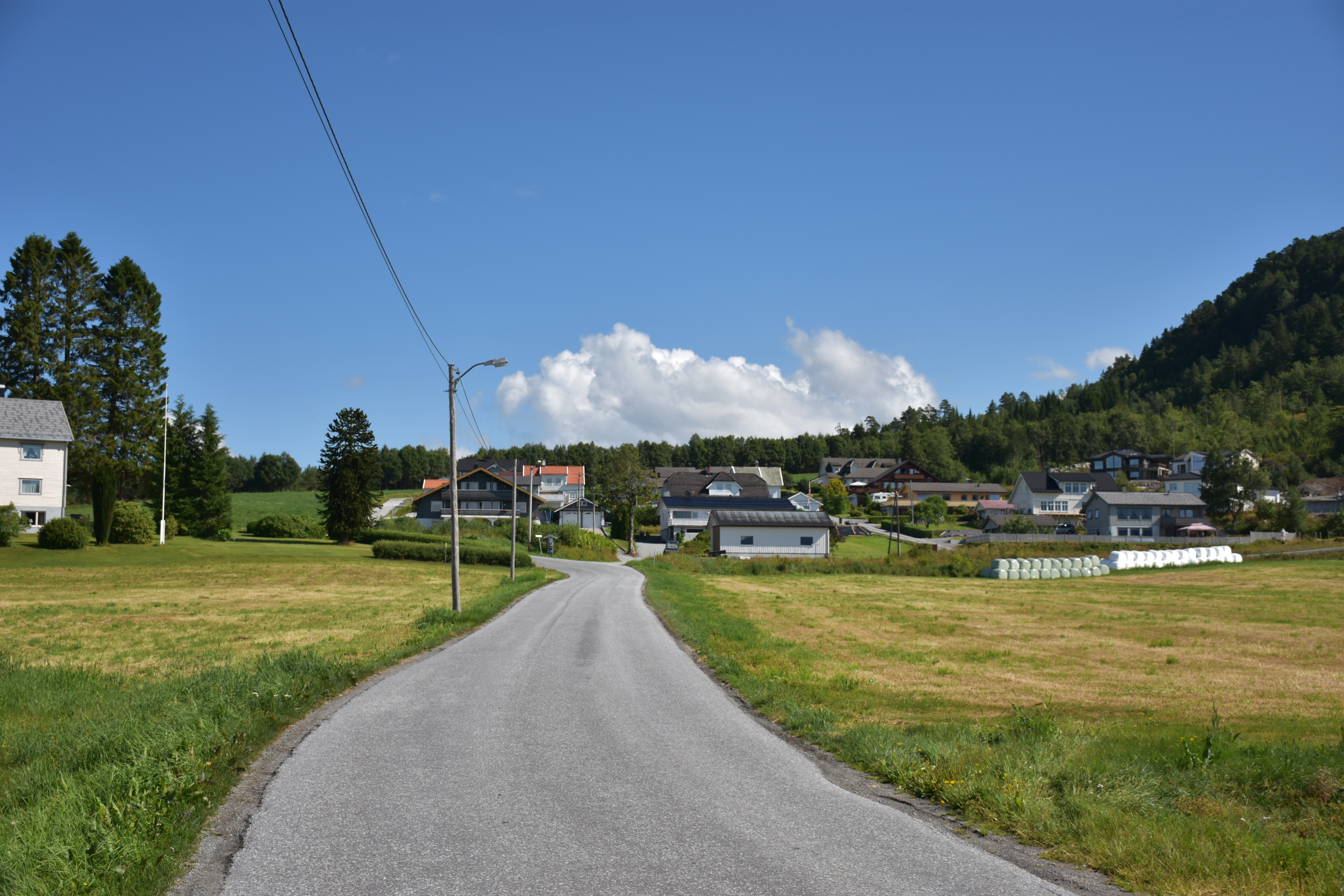 Engsetdalsvegen (fylkesvei 106) ved Skodje kirke